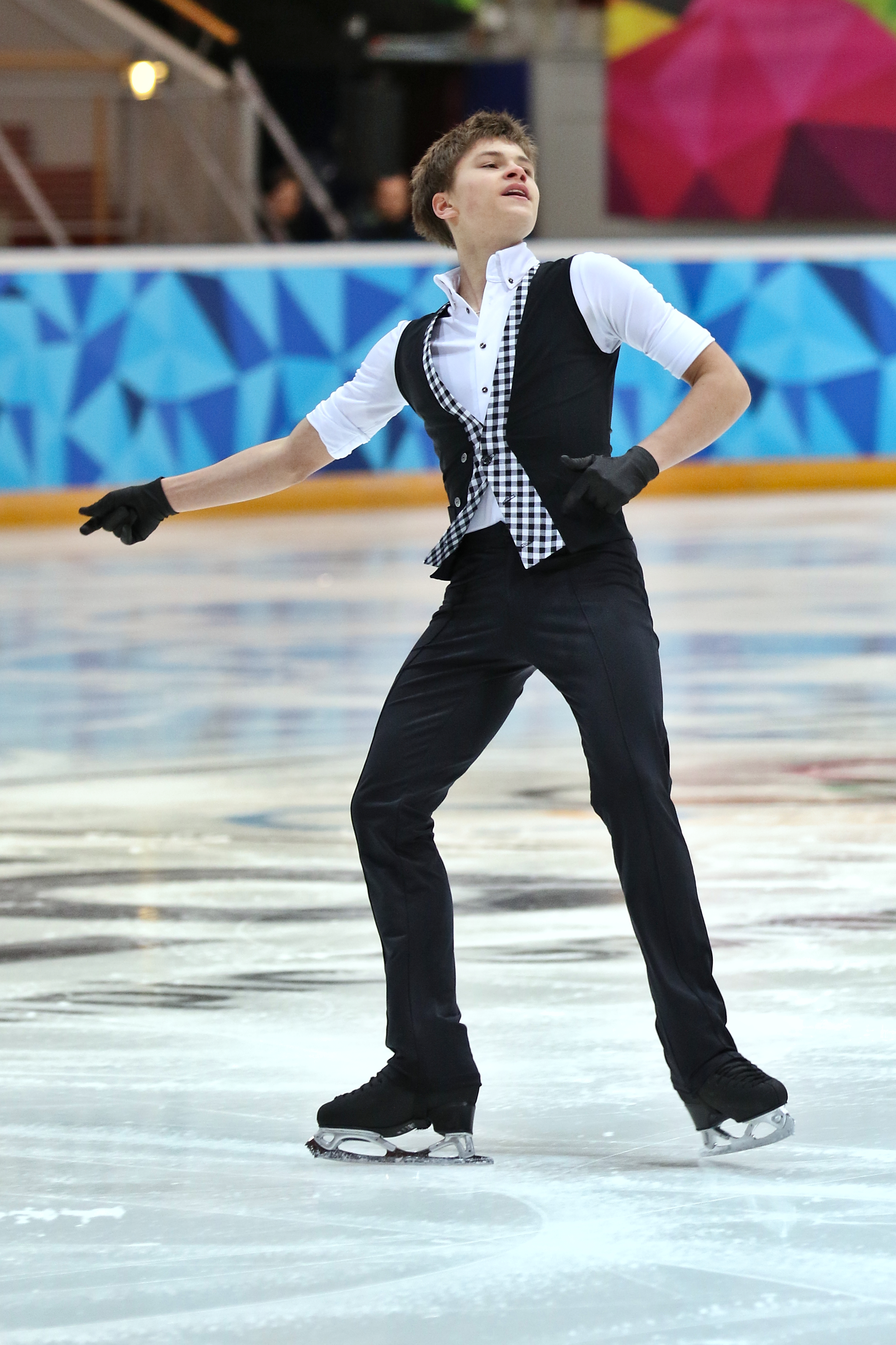 Lillehammer 2016 - Figure Skating Men Short Program - Deniss Vasiljevs